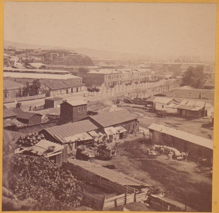 Esta imagen muestra la Avenida de la Delicias (actual Av. Argentina), en 1874. En esa época corria el estero delicias al aire libre, ya que en los años 1920s decidieron abovedarlo y taparlo, creando el actual bandejón central de la avenida, donde se instala la feria. A la izquierda de la foto se ve un cerro, que fué demolido luego del terremoto de 1906, para hacer espacio para la calle Colón.